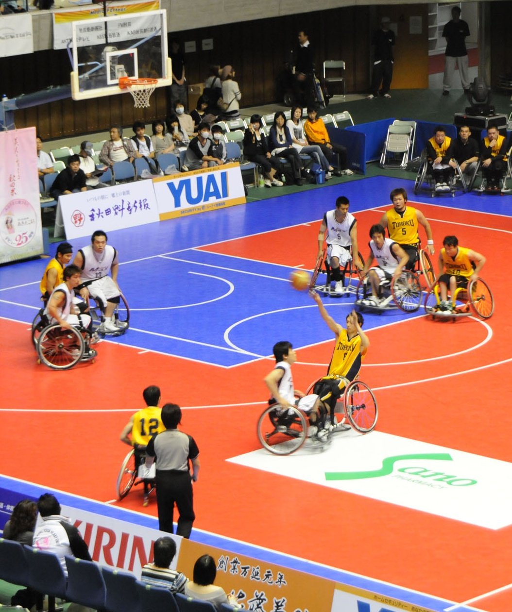 車いすバスケットボール、宮城Max対Teamみちのく、秋田県立体育館で。